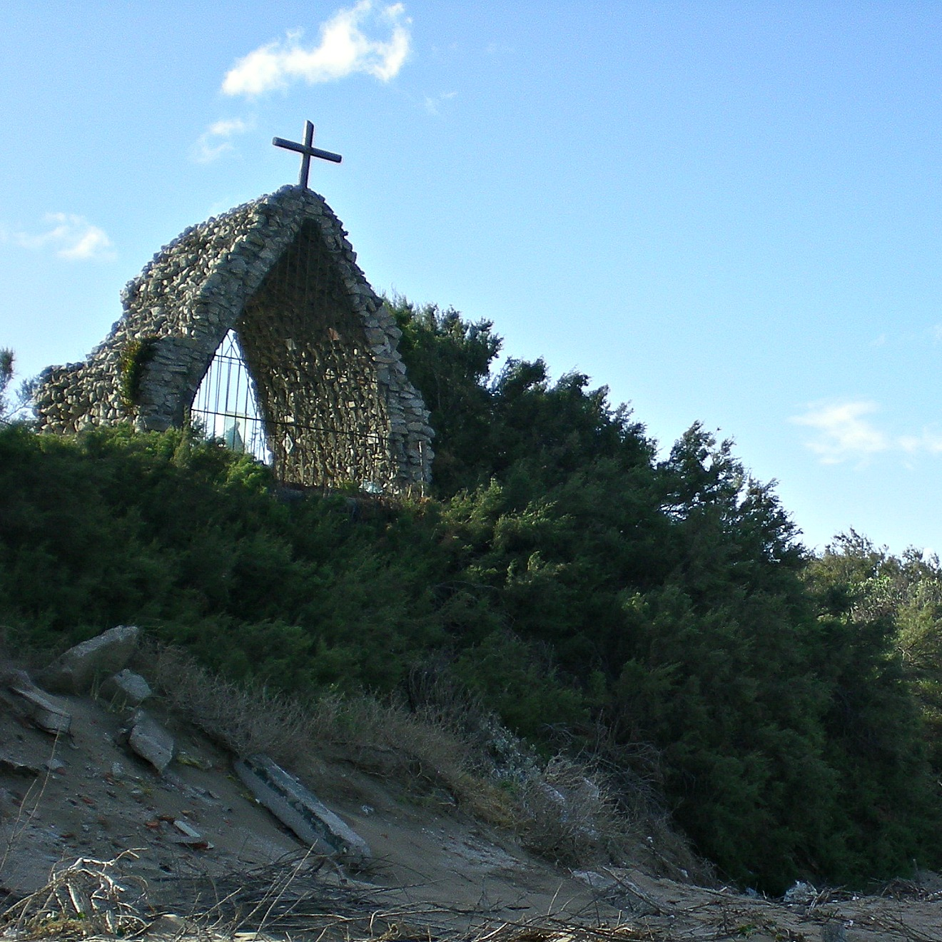 Gruta sobre un médano en la playa de Las Toninas, Partido de La Costa, Argentina.